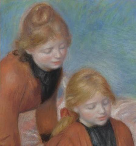 La Lecture (pormenor)